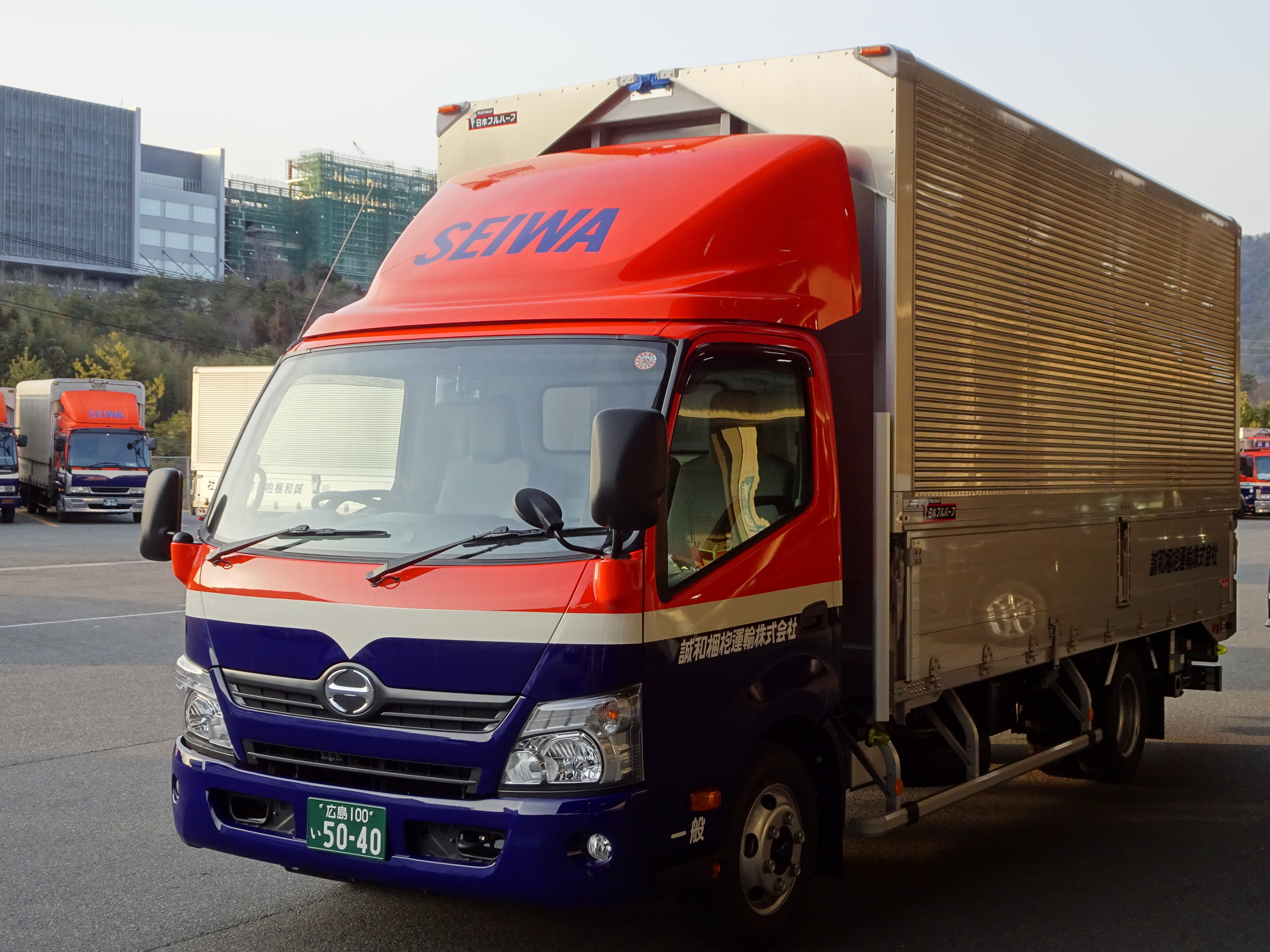 誠和梱枹運輸㈱のトラック